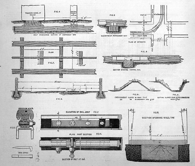 Parte del disegno, File:Larmanjat Track and Water Tower diagrams.jpg già presente su Commons, che presenta alcuni disegni per la realizzazione della via ferrata